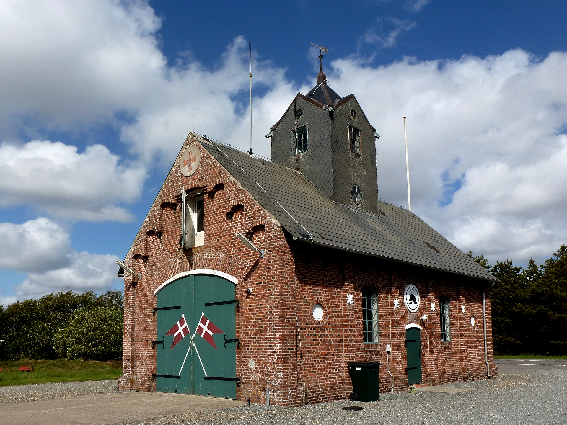 Die Alte Rettungsstation (Den Gamle Redningsstation) in Kirkeby nahe Havneby auf der Insel Rømø. Ursprünglich gebaut für die Seenotretter mit einem Rettungsboot ohne Motorantrieb, seit 1968 Station der Freiwilligen Feuerwehr (Rømø Frivillige Brandværn). Aufnahmedatum 2011-05.